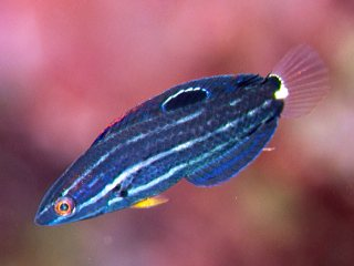 ムナテンベラ Halichoeres melanochir